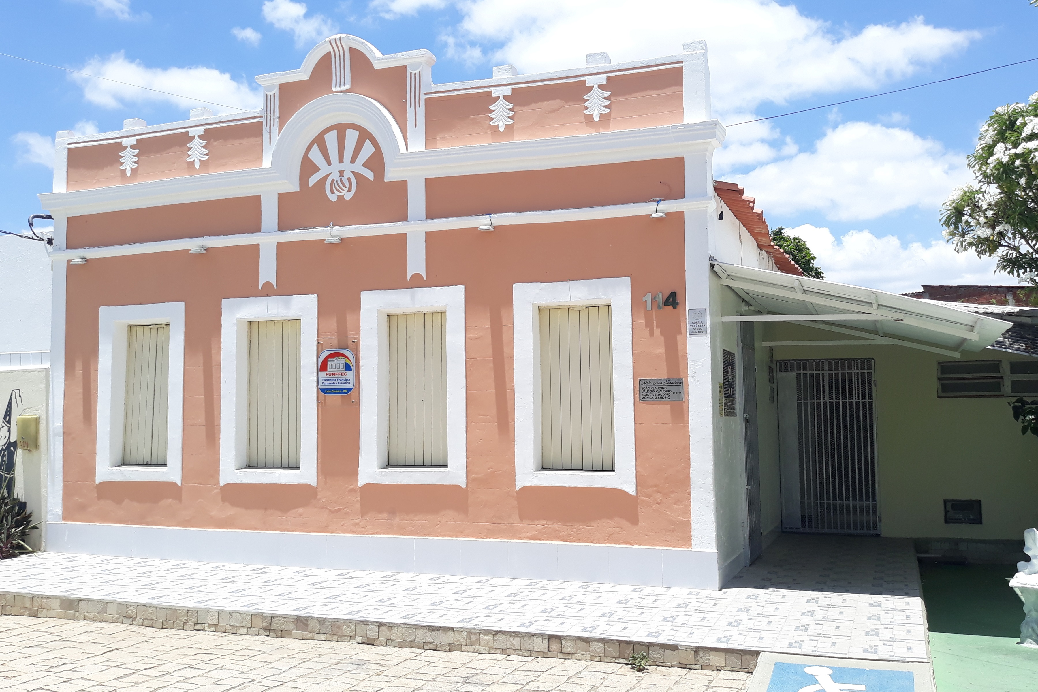 Fundação Francisca Fernandes Claudino (FUNFFEC) na Praça Joca Claudino em Luís Gomes, no Rio Grande do Norte (Brasil)